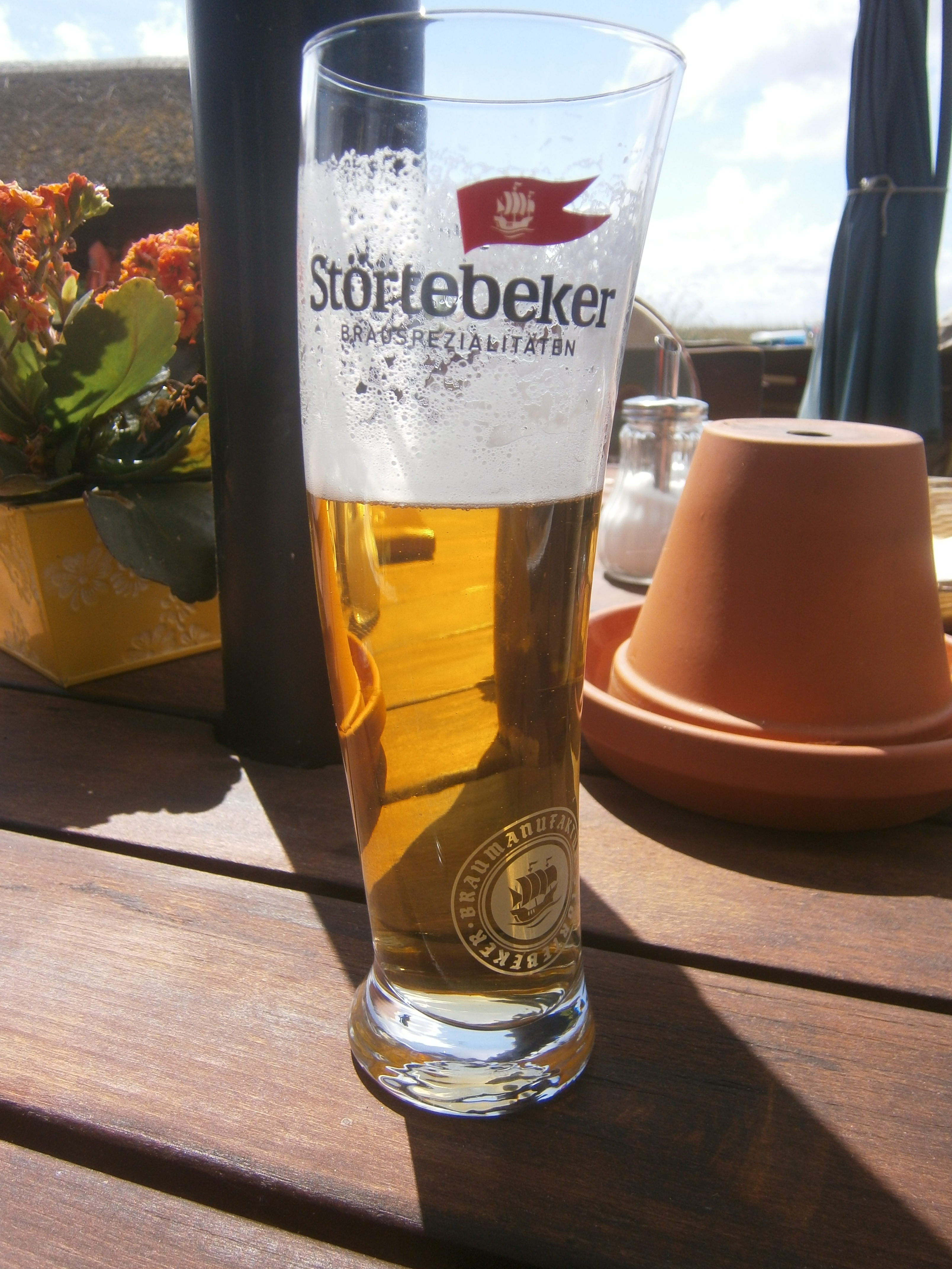 Designergläser mit Einsatz für Bier kommen in den 2000er Jahren auf um die Identität der Marke zu markieren. Das Bierglas wurde in Form eines Segels gestaltet um die Nähe zum Meer und zur Schifffahrt für die Biermarke "Störtebecker" zu kennzeichnen. Diese Glasform für ein norddeutsches Weizenbier wird in Gaststätten an der Ostsee für alle Bierarten der benannten Brauerei eingesetzt.